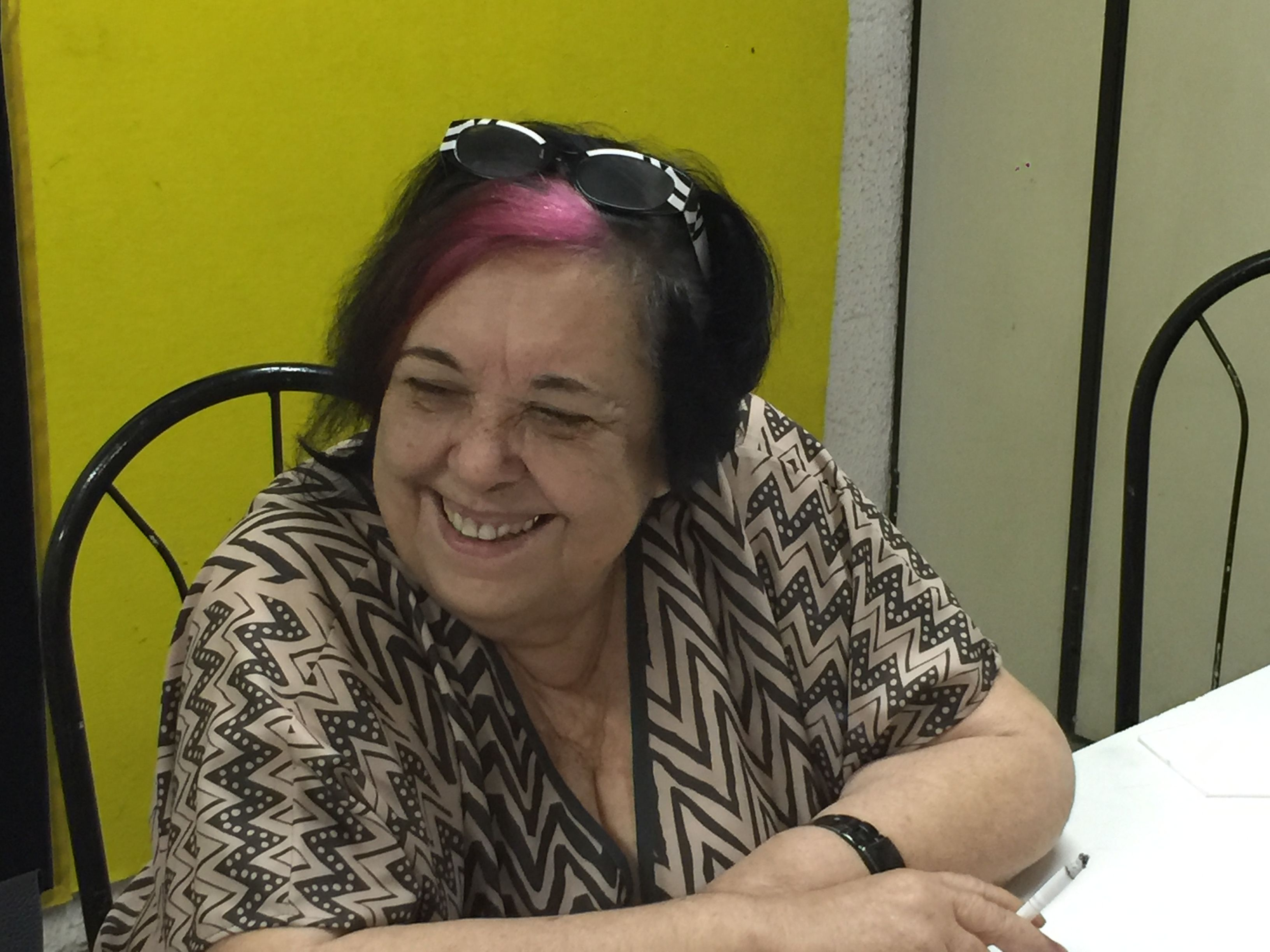 Rio de Janeiro - A carnavalesca Rosa Magalhães promete um desfile crítico e irreverente com o enredo Mais de Mil Palhaços no Salão(Cristina Indio do Brasil/Agência Brasil)